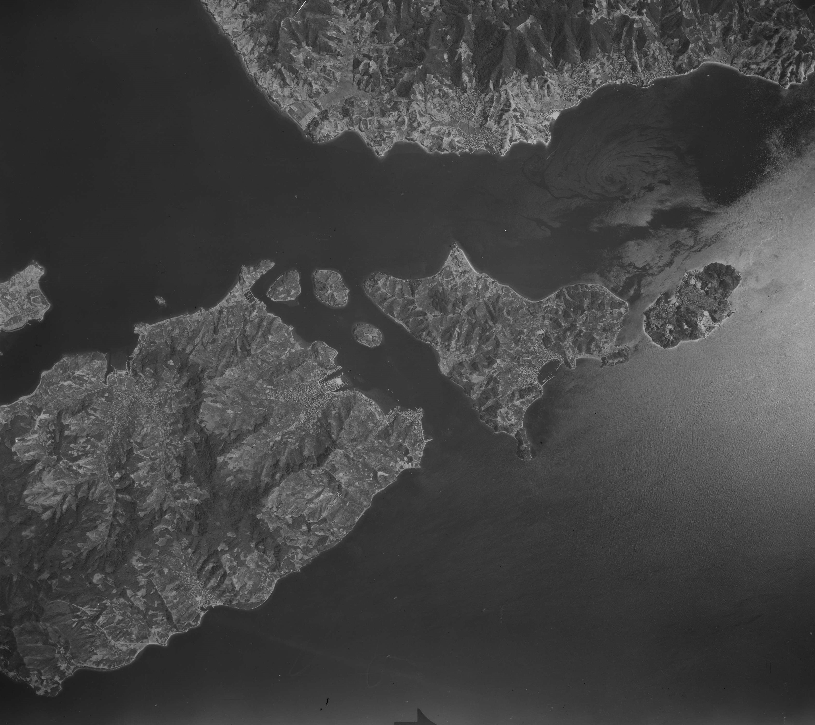 1948年の広島県呉市御手洗周辺。